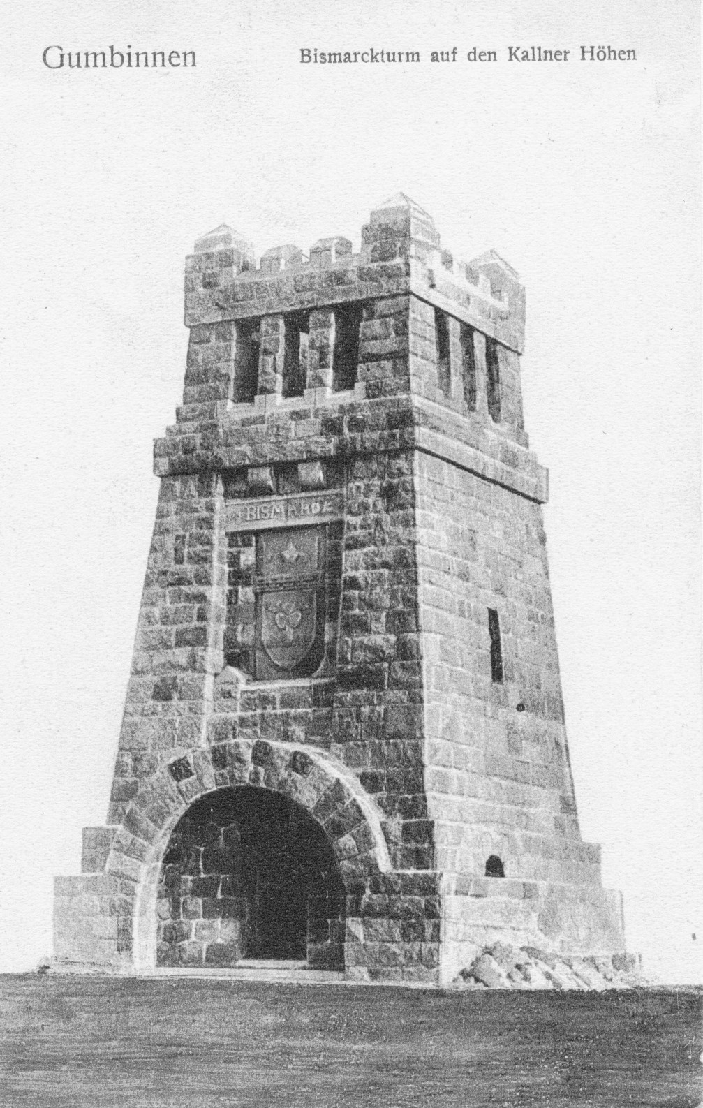 Bismarckturm auf den Kallner Bergen im Kreis Gumbinnen, Ostpreußen